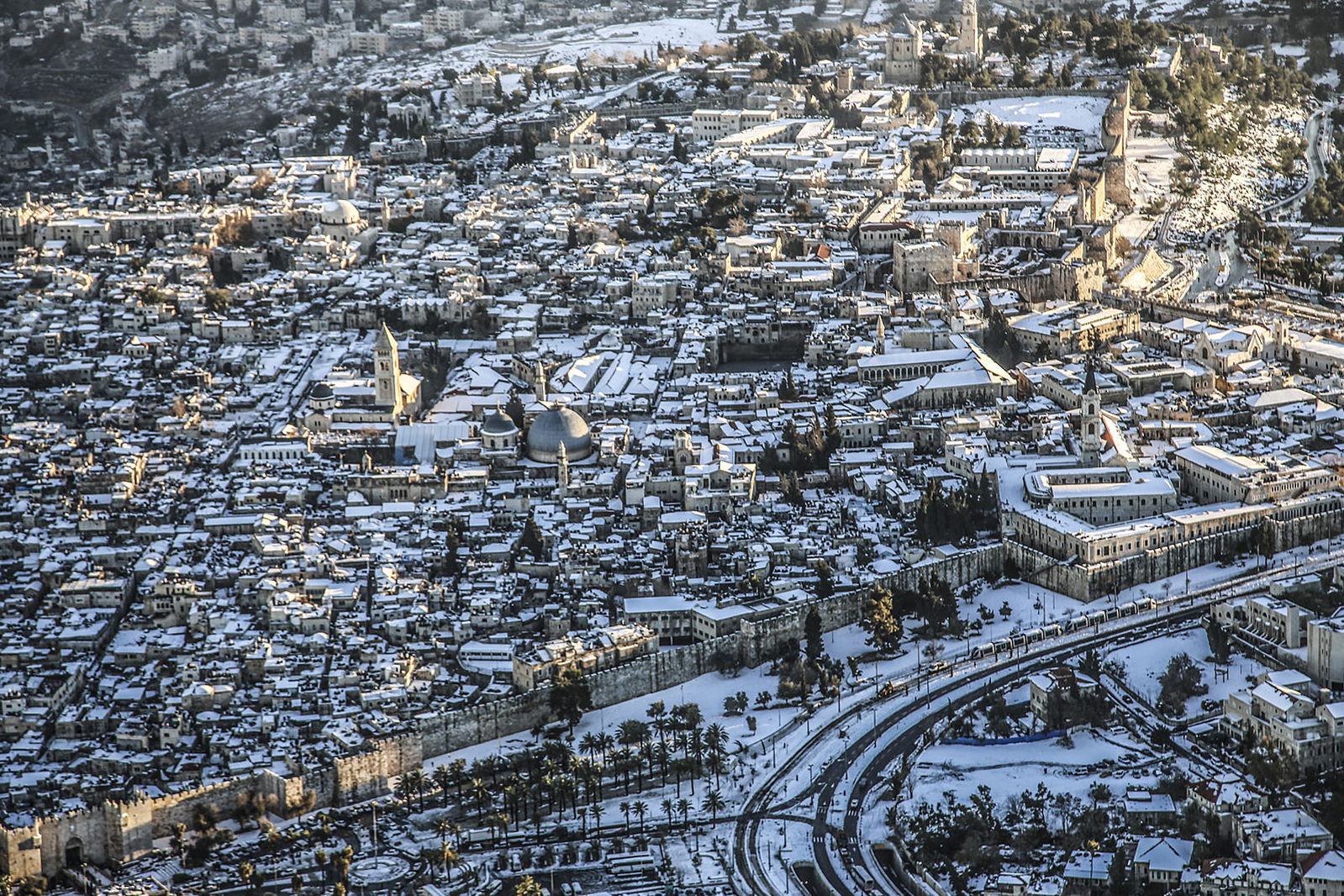 העיר העתיקה בירושלים (בערבית: بلدة القدس القديمة, נהגה: בִּלִדַת אֶלקוּדְס אֶלקָדִימָה) היא האזור העירוני העתיק של ירושלים. שטחה המוקף על ידי חומות ירושלים הוא כ-850 דונם.כמו כן נכללים בעיר העתיקה הר ציון ועיר דוד, הנמצאים מחוץ לחומות, בסמוך ומצד דרום. העיר העתיקה מהווה מוקד משיכה מרכזי לתיירים בני דתות ואומות שונות, אשר באים מרחבי העולם לבקר את האתרים הקדושים הנמצאים בה, ובהם: הר הבית, הכותל המערבי וכנסיית הקבר.